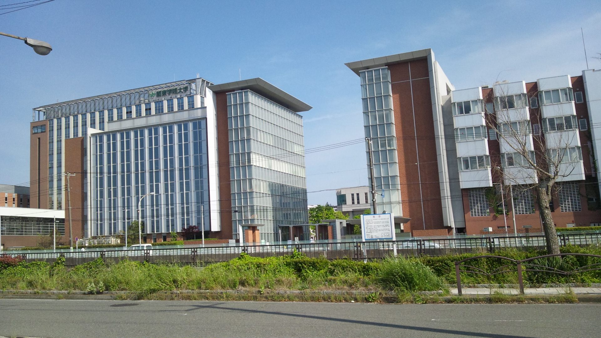 ５月１９日に撮影